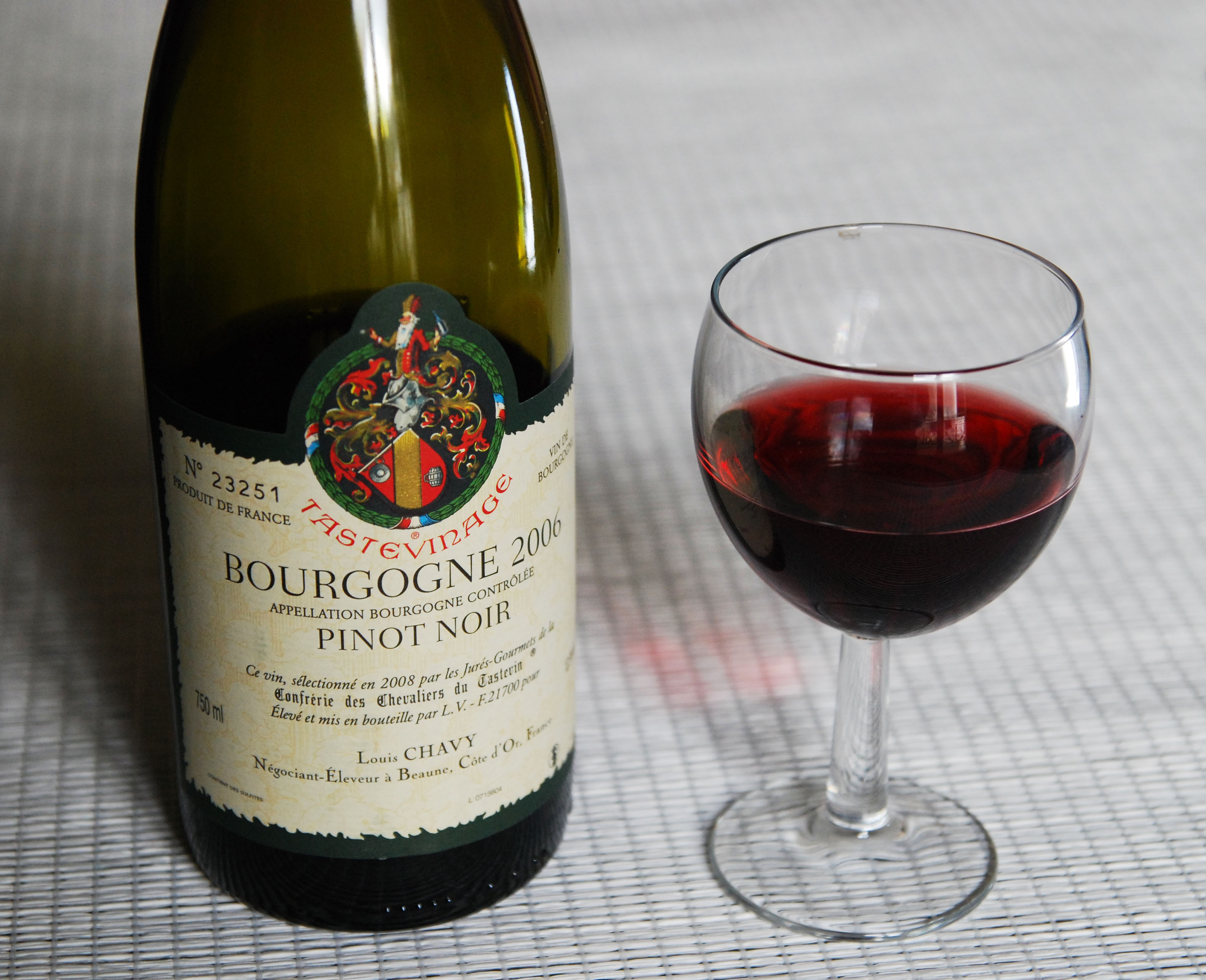 Pinot noir